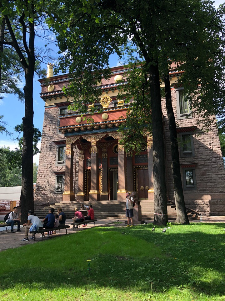 Datsan's facade in the summer